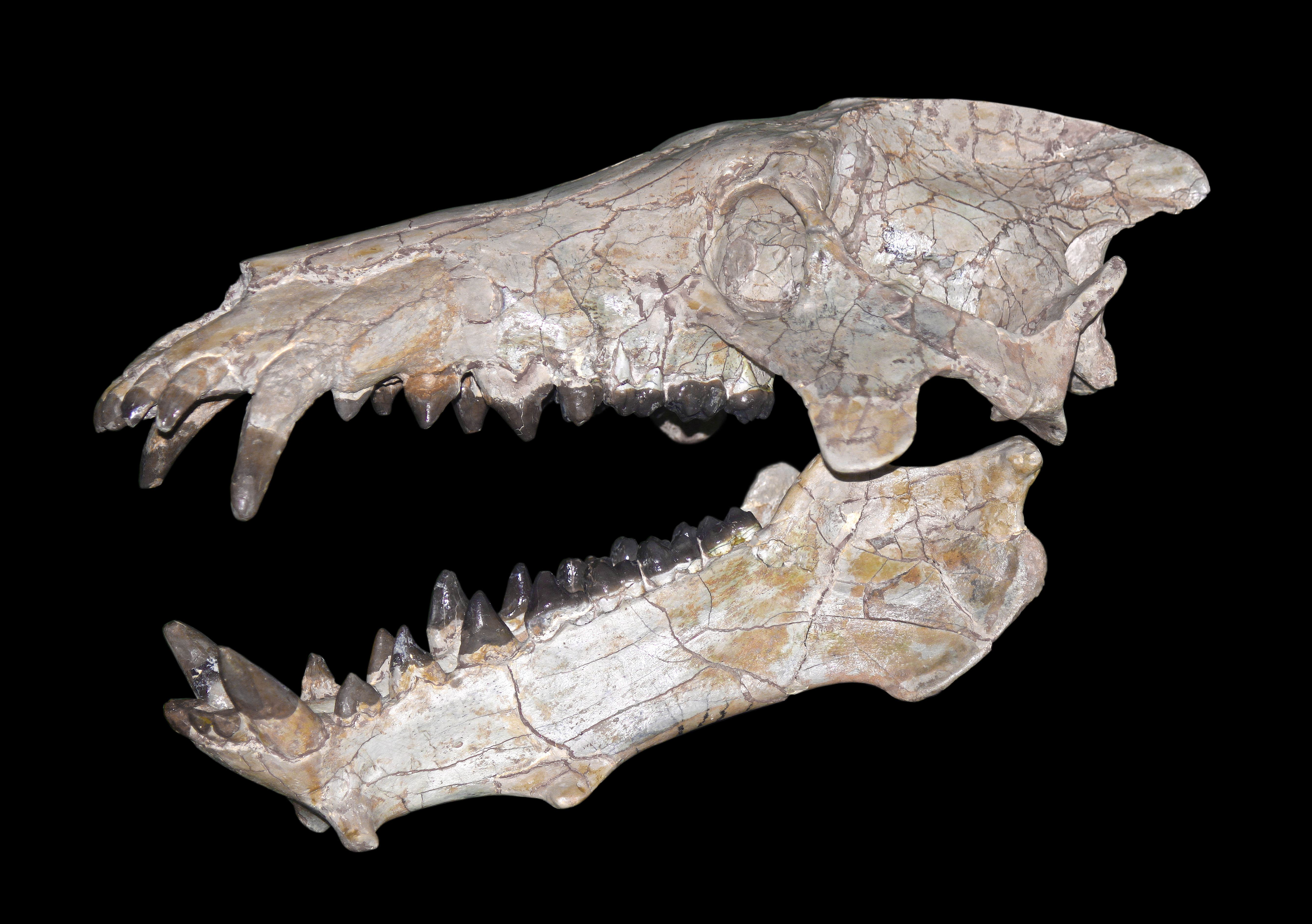 Archaeotherium mortoni, Entelodontidae, Schädel; Oligozän, South Dakota, USA; Staatliches Museum für Naturkunde Karlsruhe, Deutschland.